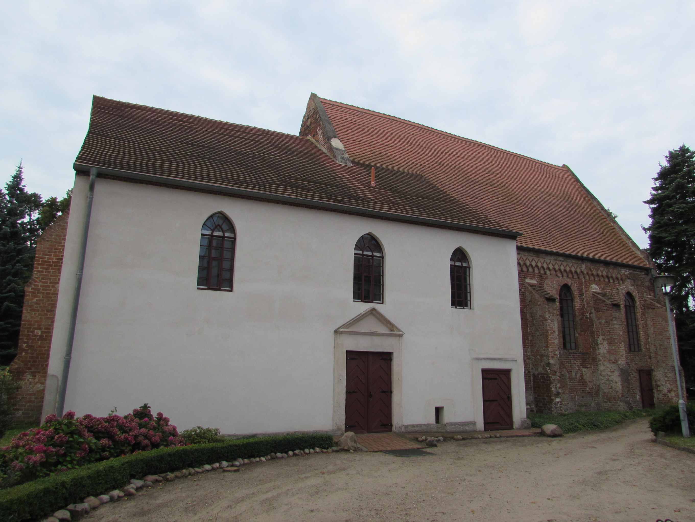 kirche plaue